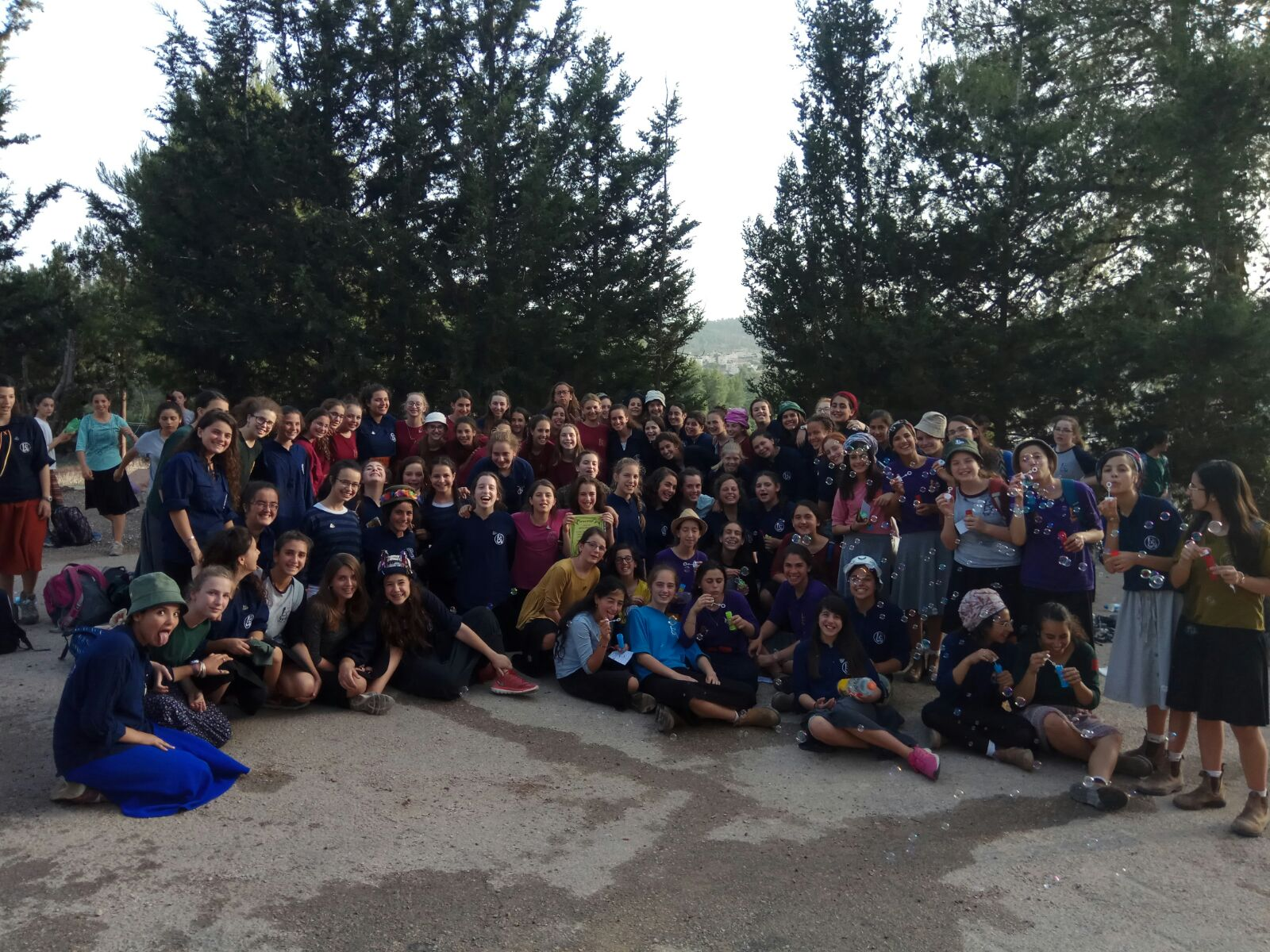 מסע פסח